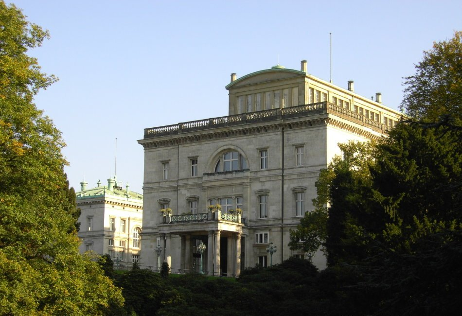 Villa Hügel in Essen